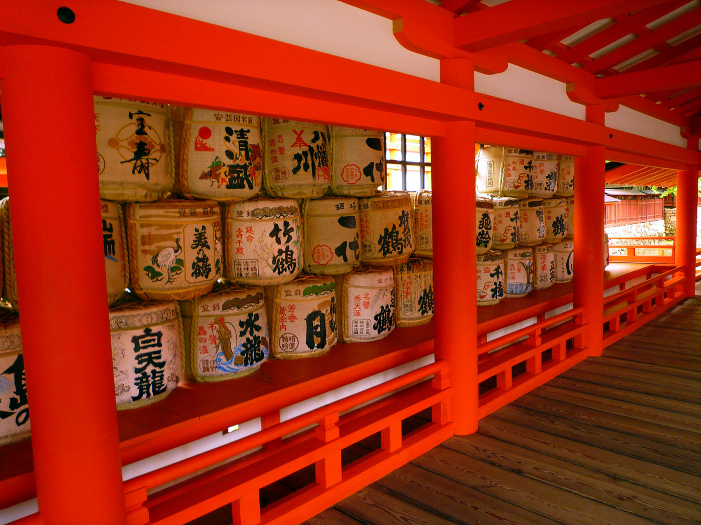 Sake barrels in Itsukushima Shinto Shrine (Miyajima, Hiroshima, Japan).